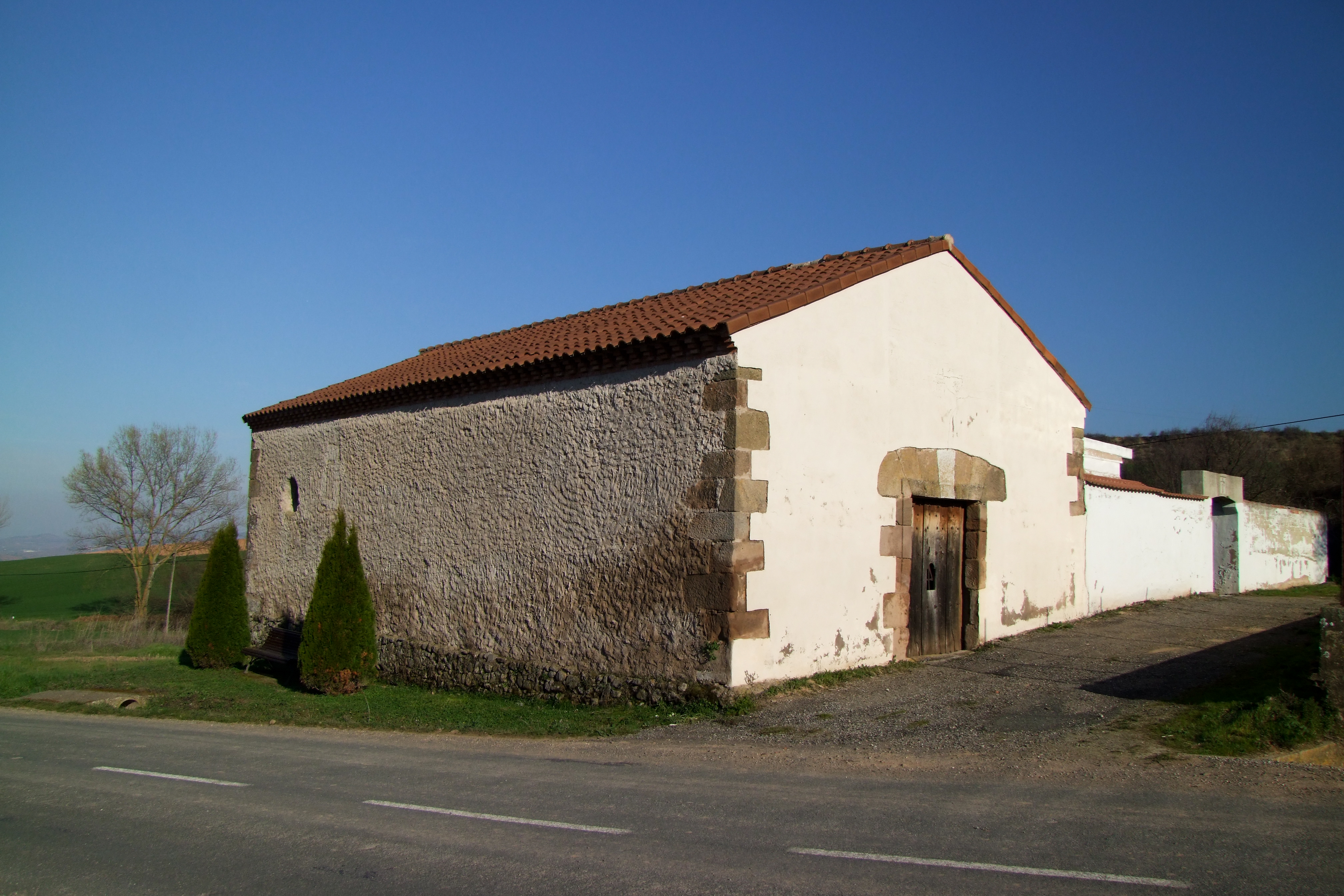 Ermita de Santa Ana en la localidad de Villarejo, La Rioja - España